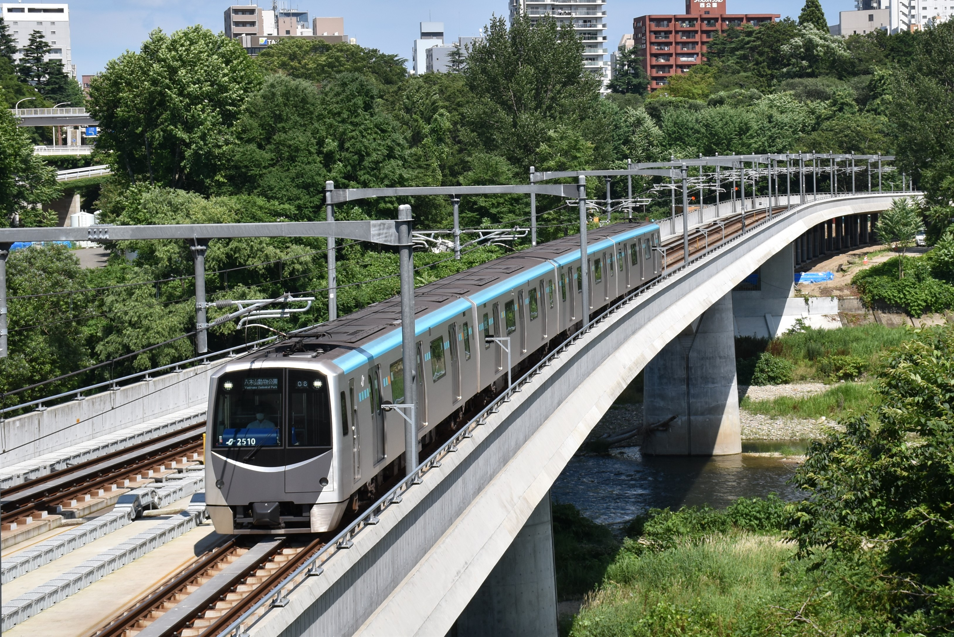 仙台市地下鉄 2000系 国際センター駅付近